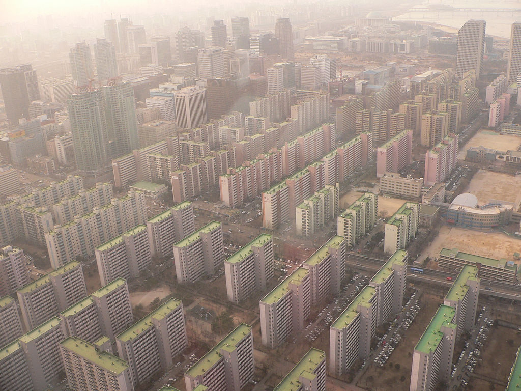 서울의 아파트촌